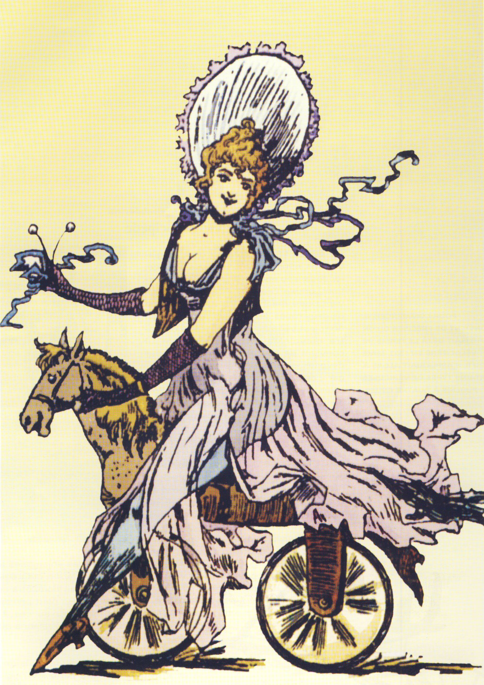 Illustration der Operette Les Vélocifères aus dem 19. Jahrhundert